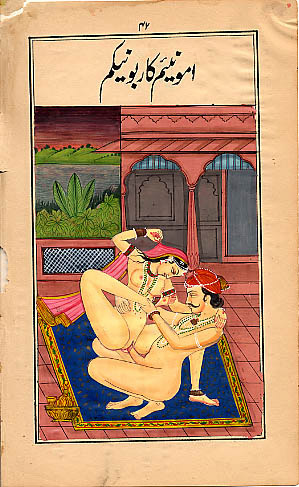 Kama Sutra Illustration